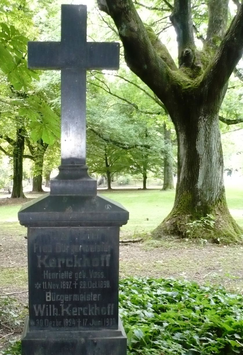 Grabstein von Wilhelm Kerckhoff im heutigen Gervinuspark in Essen-Frohnhausen